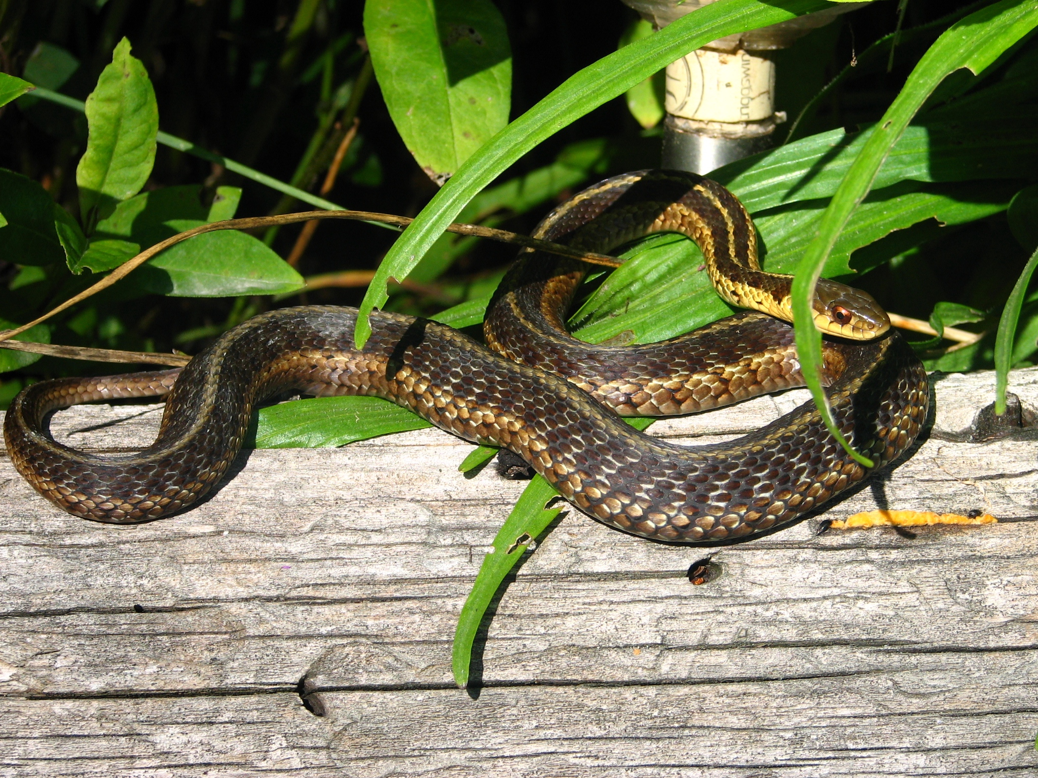 Couleuvre rayée du Québec Thamnophis sirtalis sirtalis